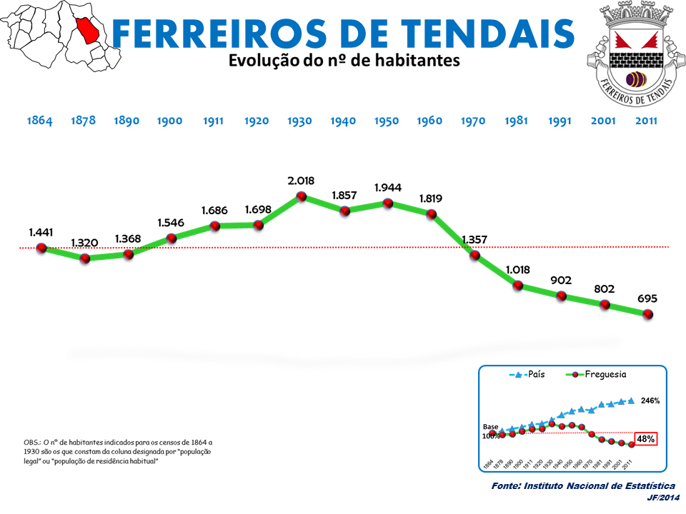 Evolução da População 1864 / 2011